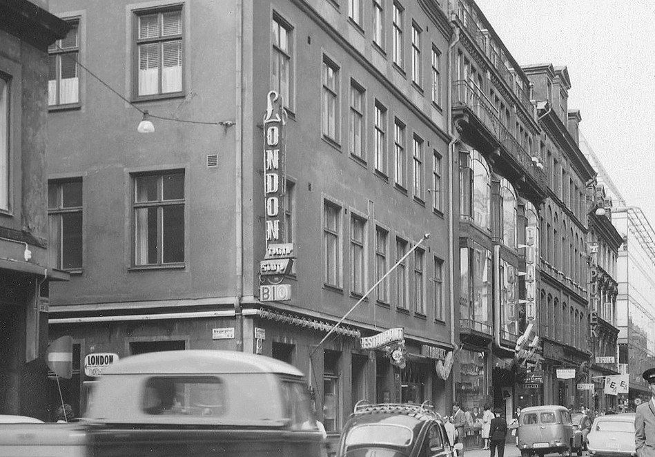 Hörnet Drottninggatan / Bryggargatan med Restaurant 55:an och Butterick's hus samt Biograf Londons skylt